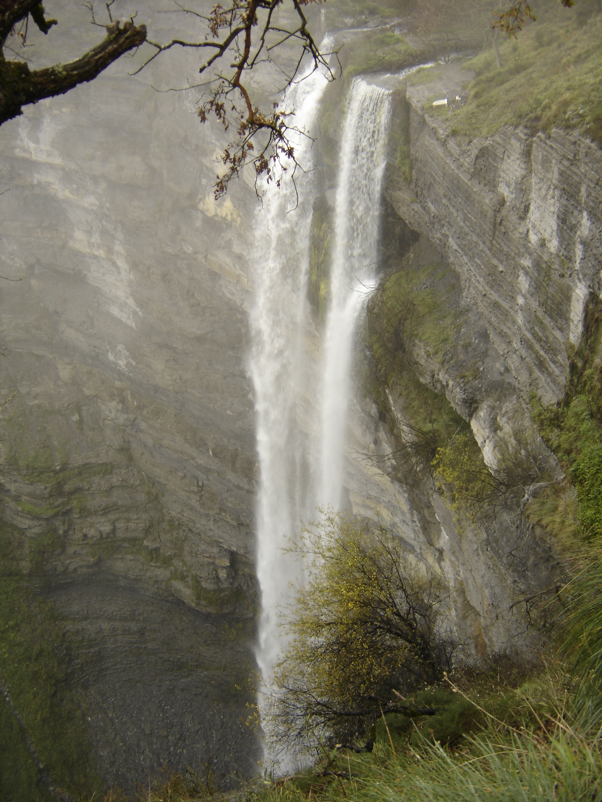 Cascada de Gujuli en Álava (España).